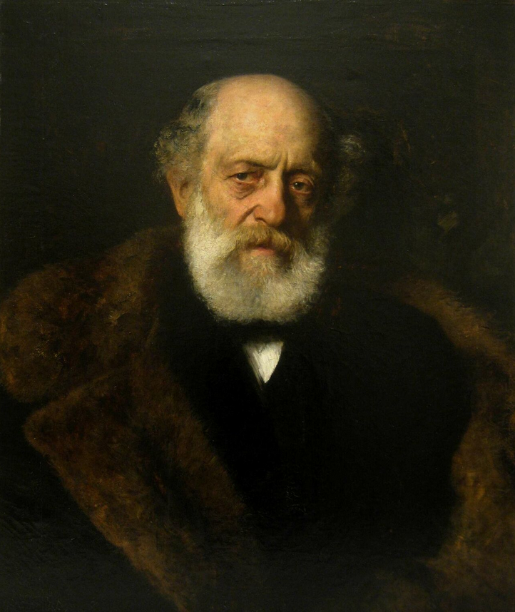 Foto: A.Olczak, Berlin